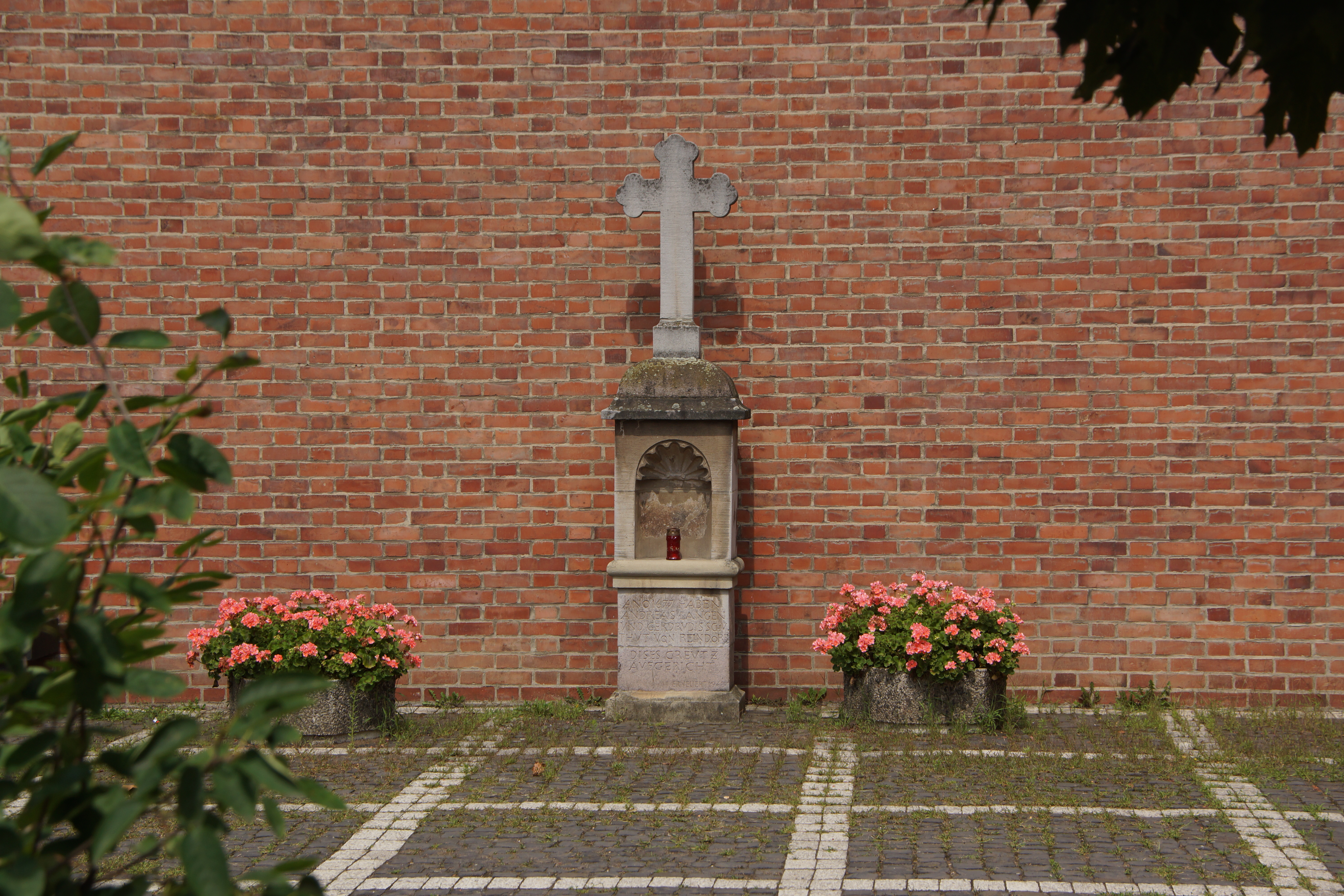 Das Wegekreuz wurde ursprünglich 1677 errichtet und 1968 nach seiner Renovierung an der Pauluskirche in der Siegburger Straße aufgestellt. Die Einzelteile wurden 1967 etwa 400 Meter östlich wiederentdeckt.